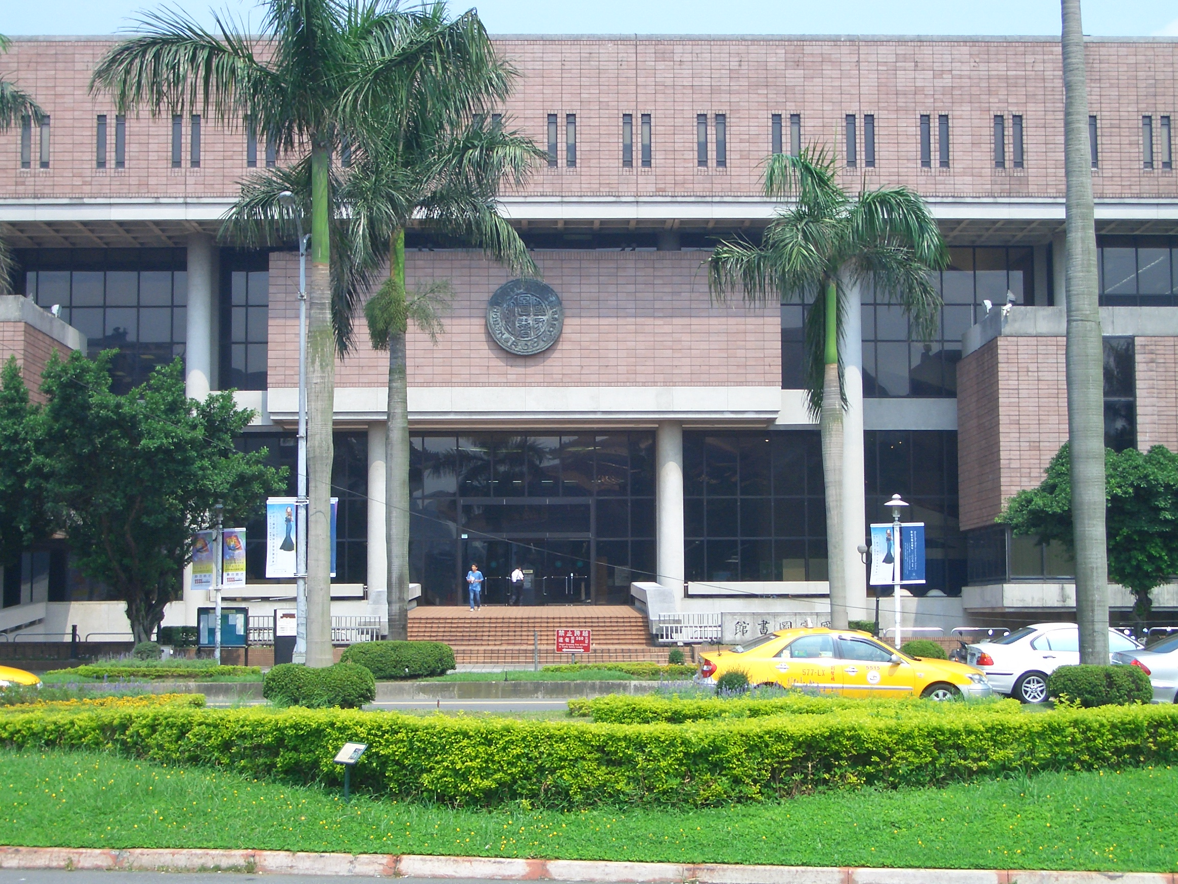 中華民國國家圖書館總館。